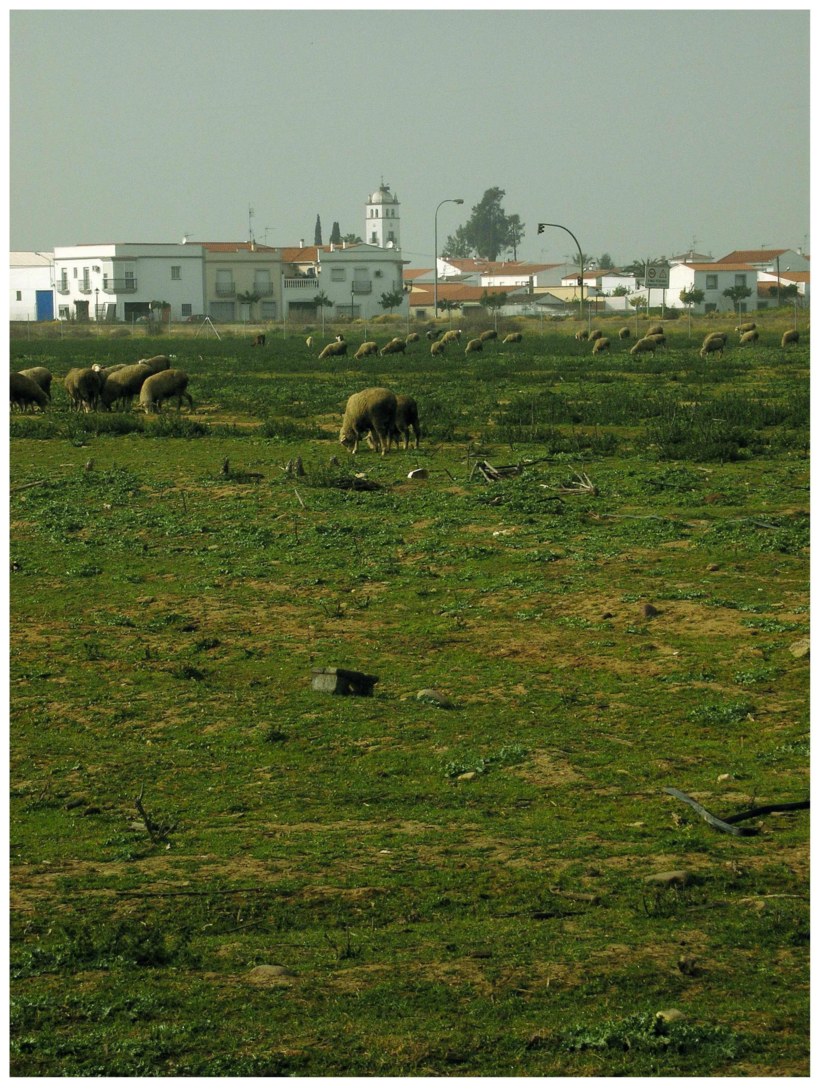 Estremeñu: Valdelacarçá